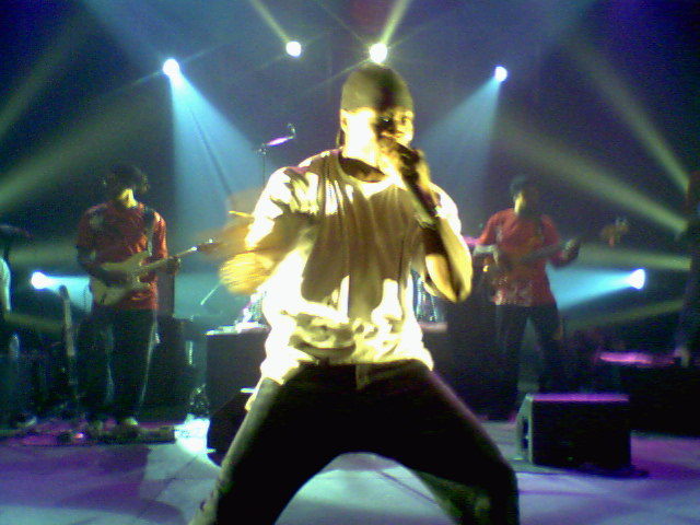 Festi'Val-de-Marne